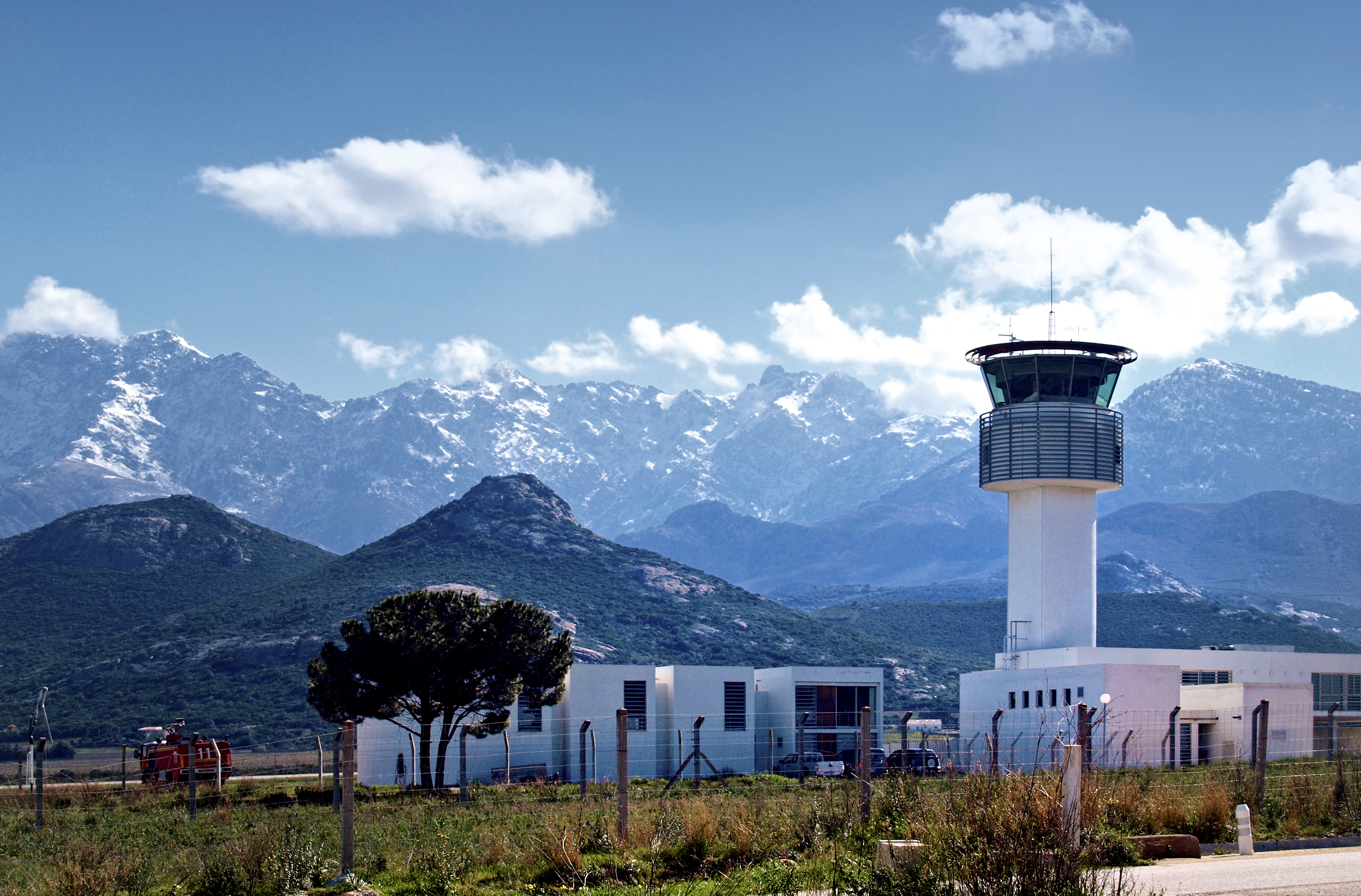 Calvi (Corsica) - Tour de contrôle de l'aéroport Sainte-Catherine. Derrière, le Capu a u Dente